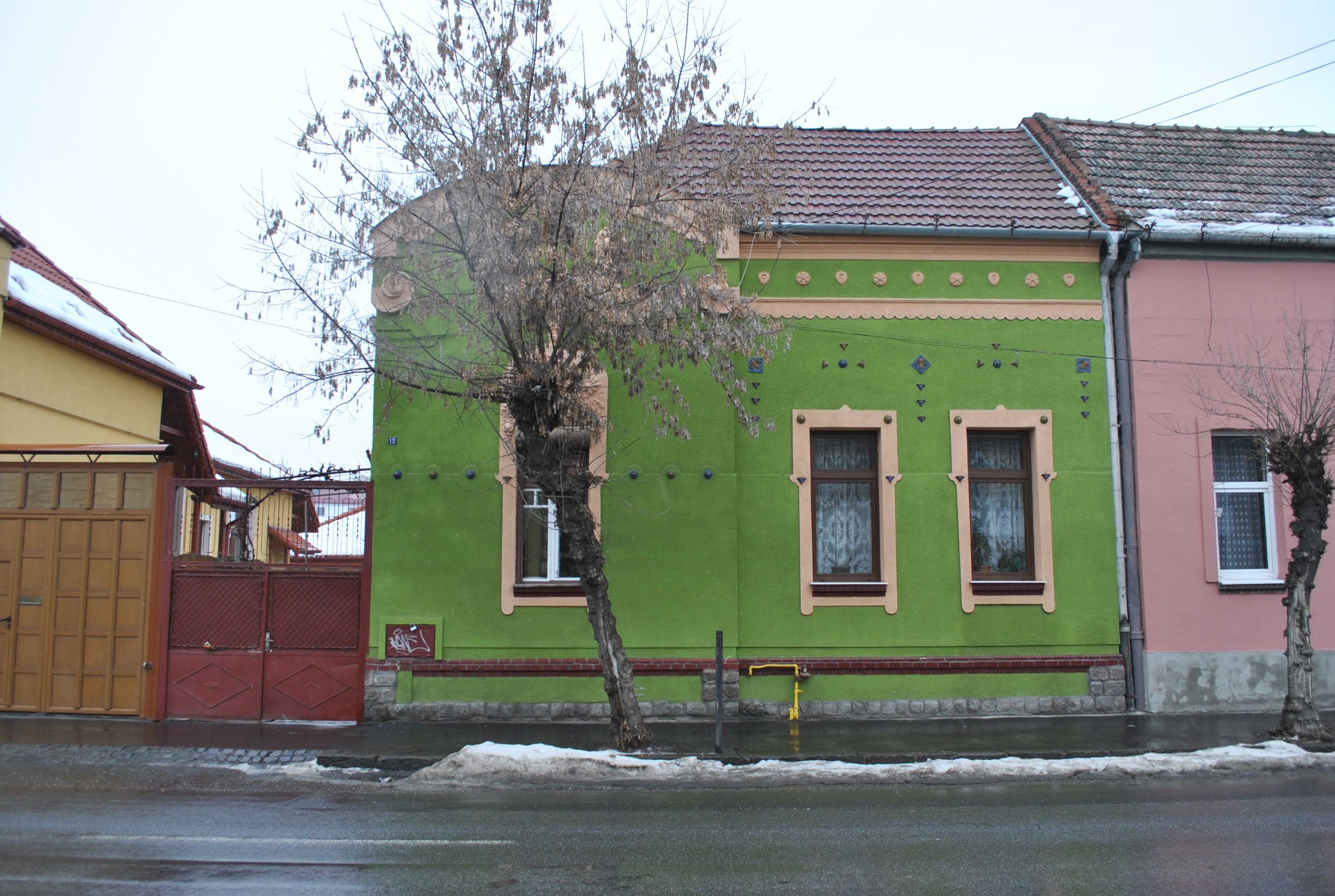 Ansamblul urban "Str. Rodnei"